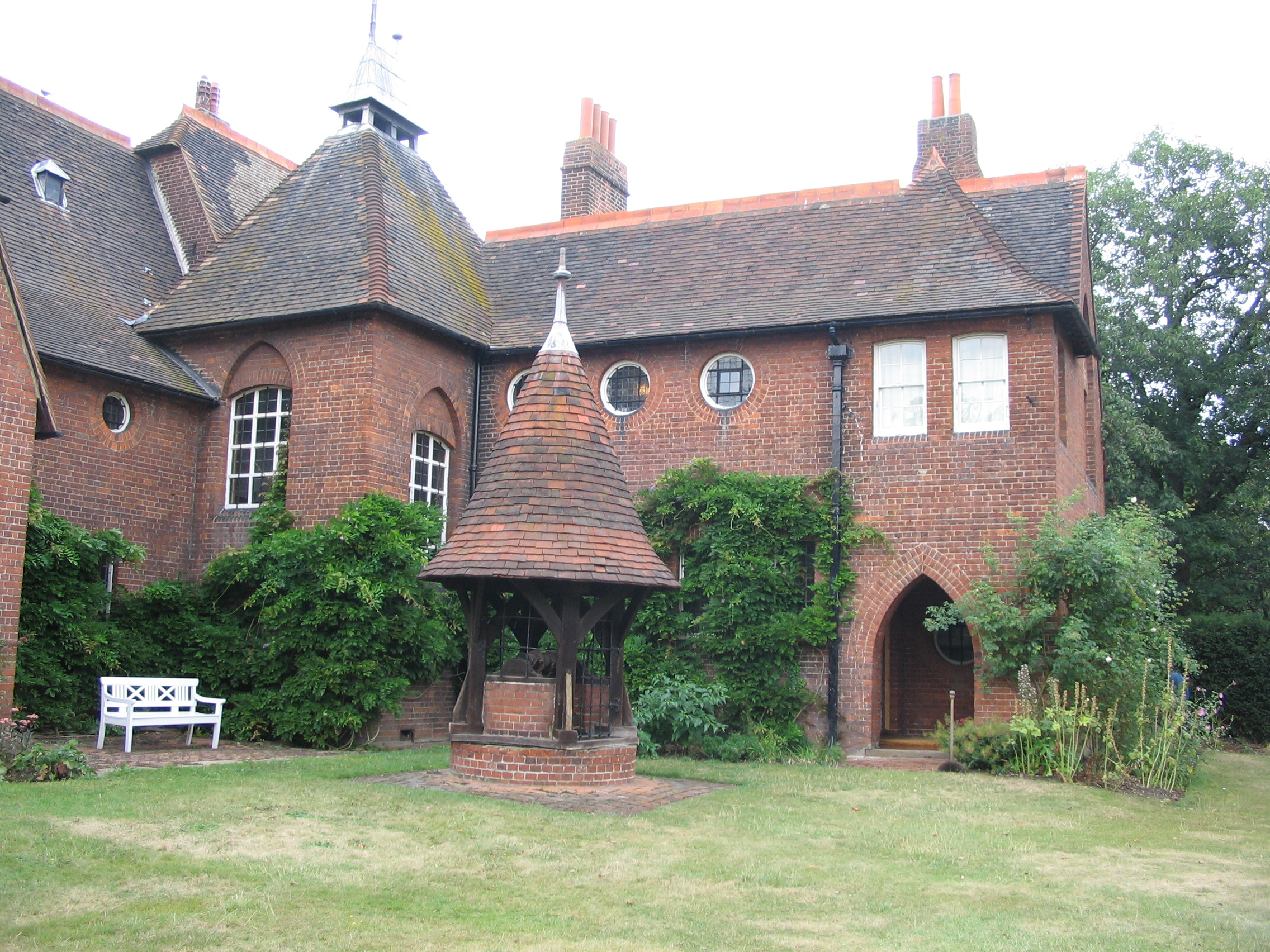 The Red House in Bexleyheath - augustus 2006 eigen foto thumb|left|zelfde huis op Commons, iets andere hoek en ander seizoen